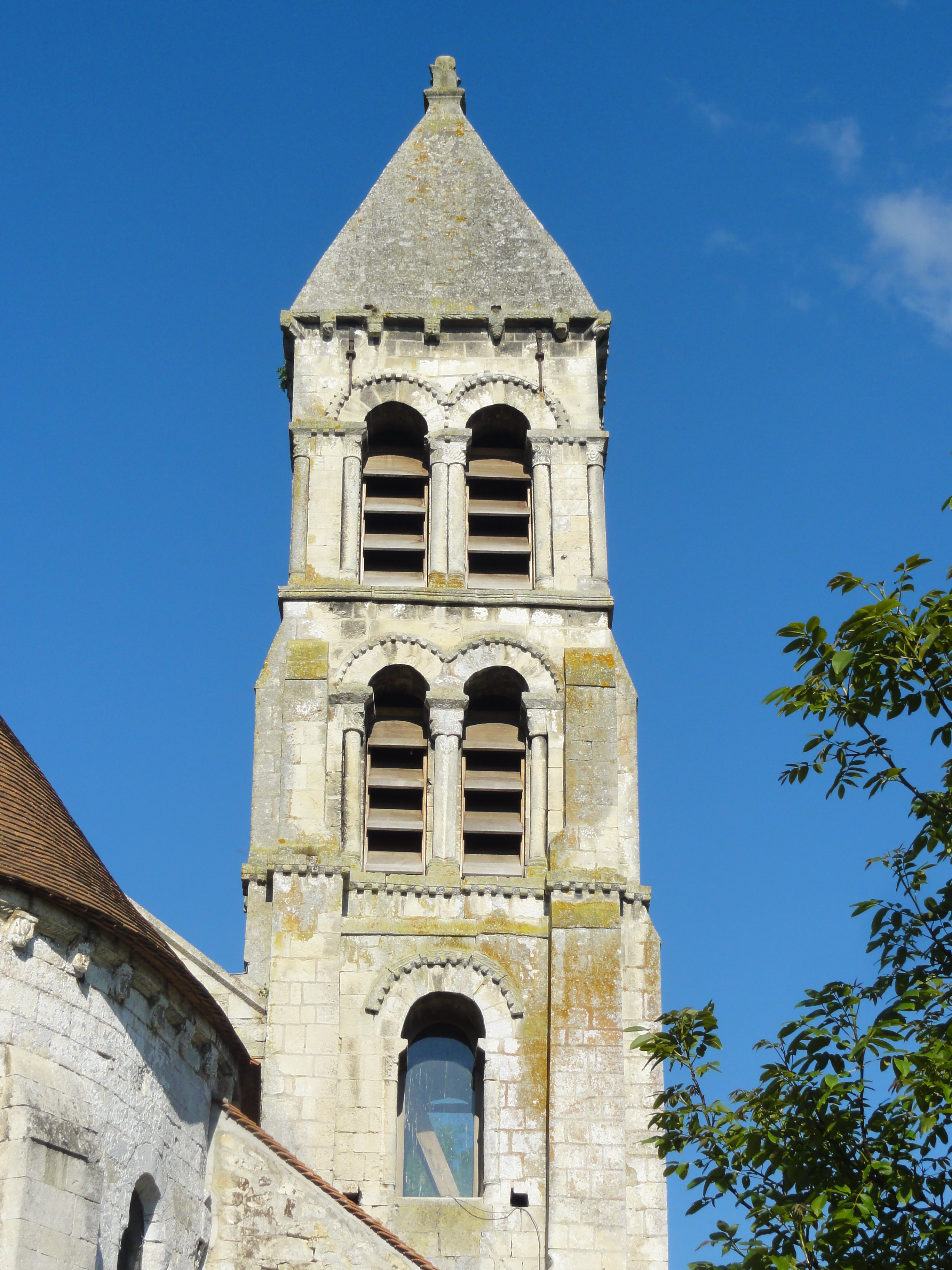 Clocher, côté est.